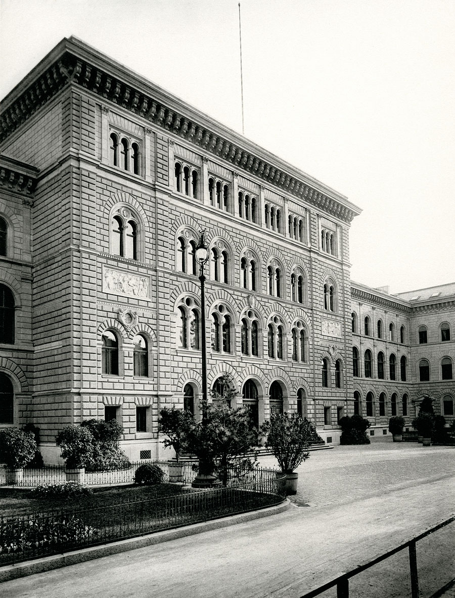 Bundeshaus-Ostbau. Erbaut 1888–1892 von Hans Auer.